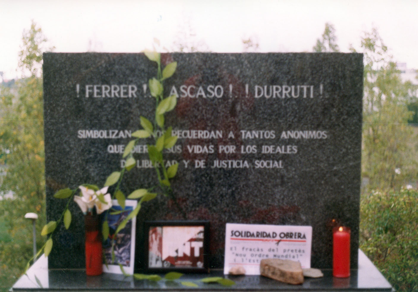 cementiri Montjuïc, tomba DURRUTI